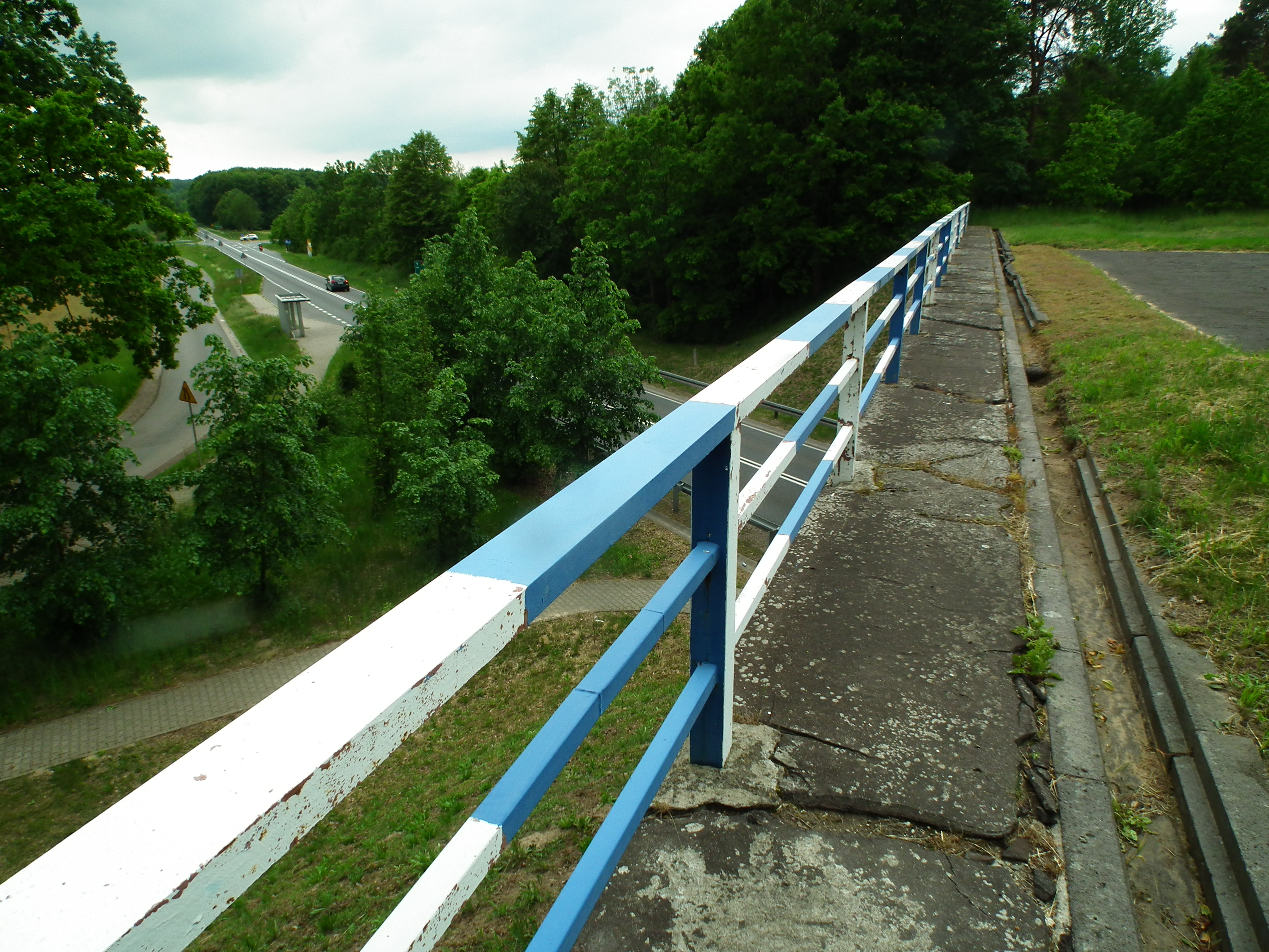 Lisowo. Wiadukt starej autostrady. Była budowana w czasie II wojny światowej w czasie okupacji Polski. Niemieccy naziści nigdy jej nie dokończyli.